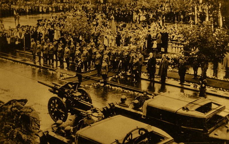 Motorizált tüzérség vonulása a kormányzói díszszemlére Marosvásárhelyen.